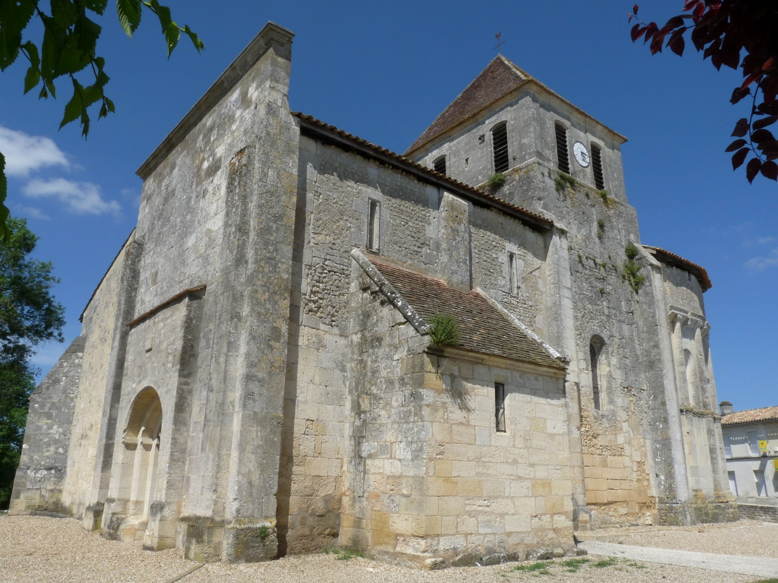 Eglise de St-Martin-du-Bois, Gironde, France